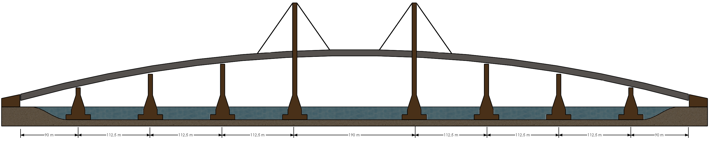 Dimensions (en m) du pont de Deh Cho sur le fleuve Mackenzie dans les Territoires du Nord-Ouest. Selon les plans d'Infinity Engineerers